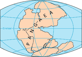 Pangea Gevonden op: Afbeeldingen van de USGS zijn publiek domein.